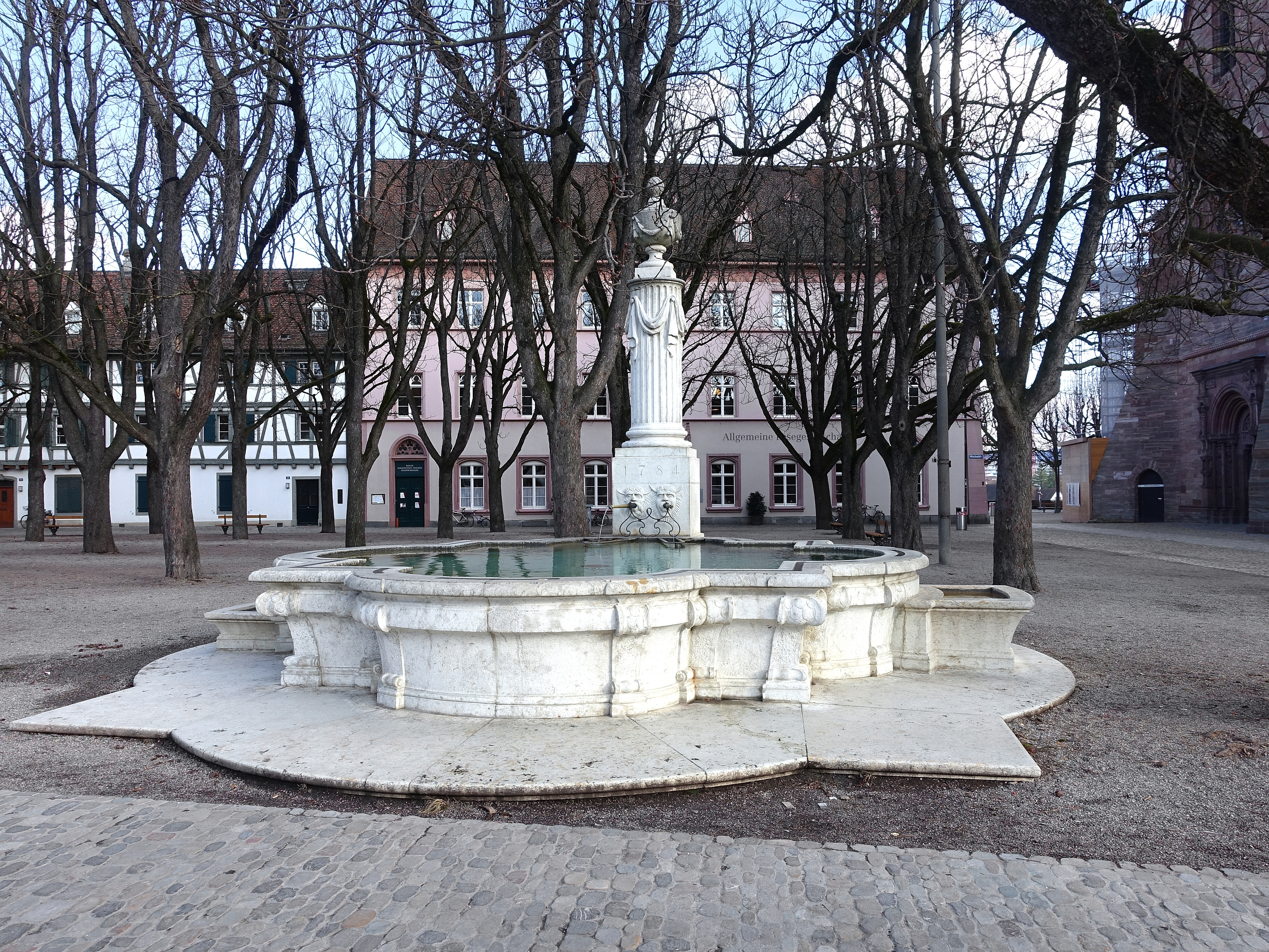 Paolo Antonio Pisoni (1738–1804), Pisoni-Brunnen auf dem Münsterlplatz von Basel